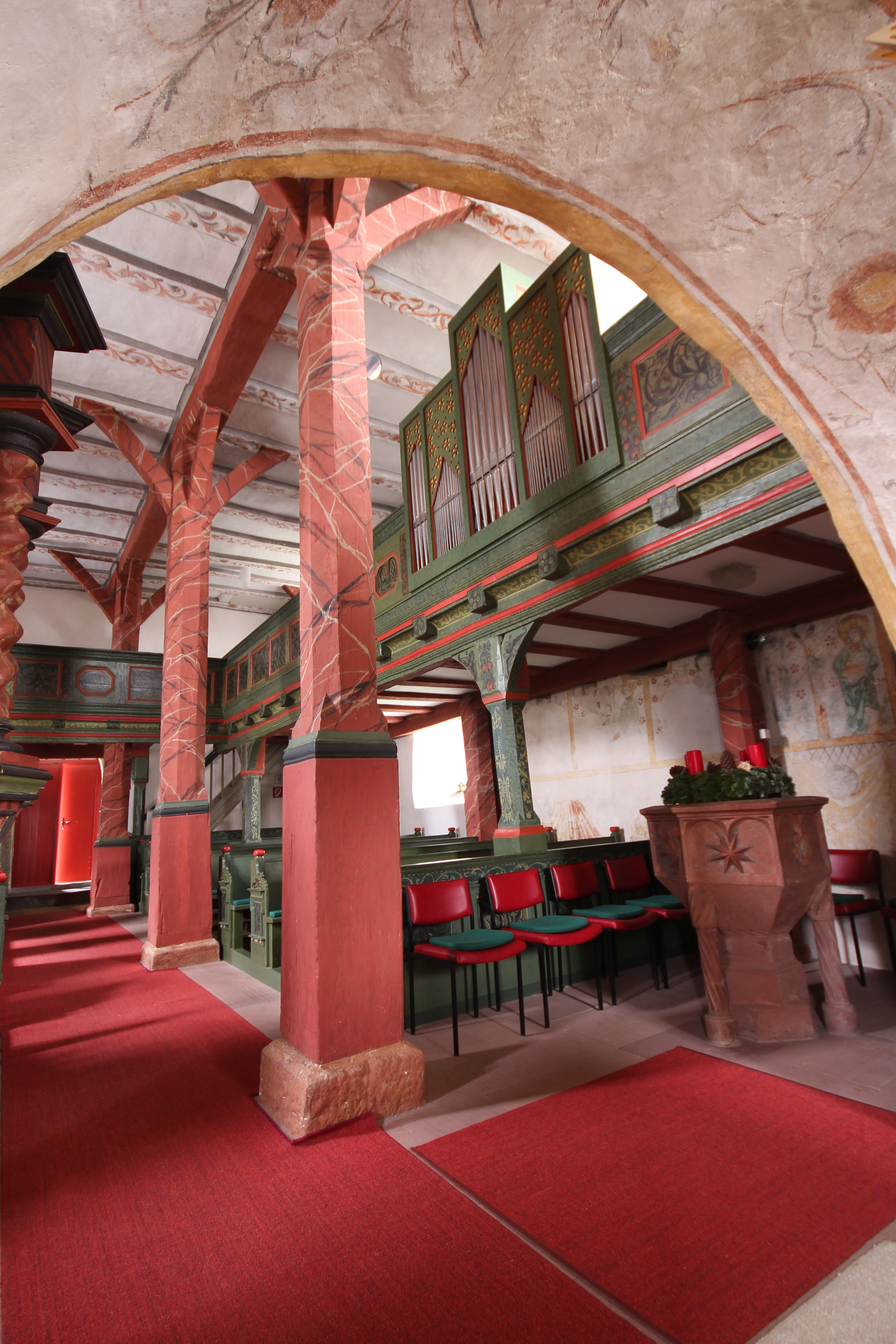 Evangelische Kirche Frankenbach, Gemeinde Biebertal, Landkreis Gießen, Hessen, Deutschland